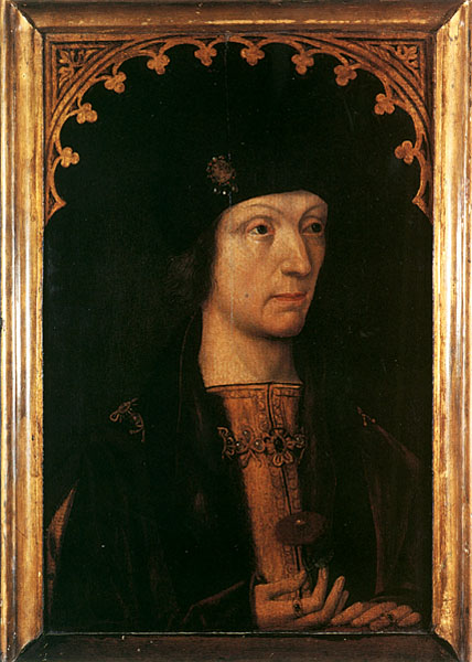 Копия с утраченного портрета Генриха VII